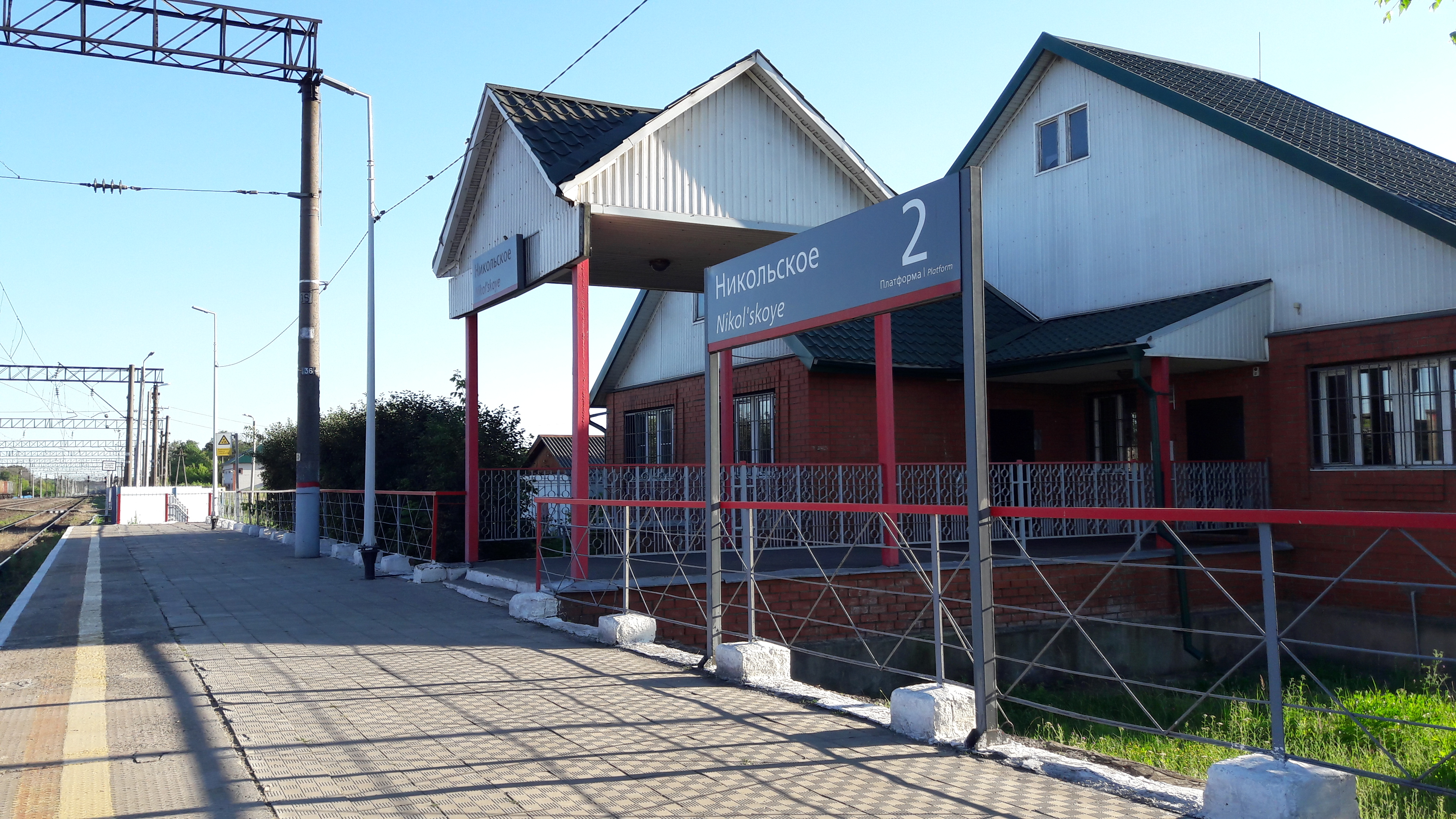 2020 год